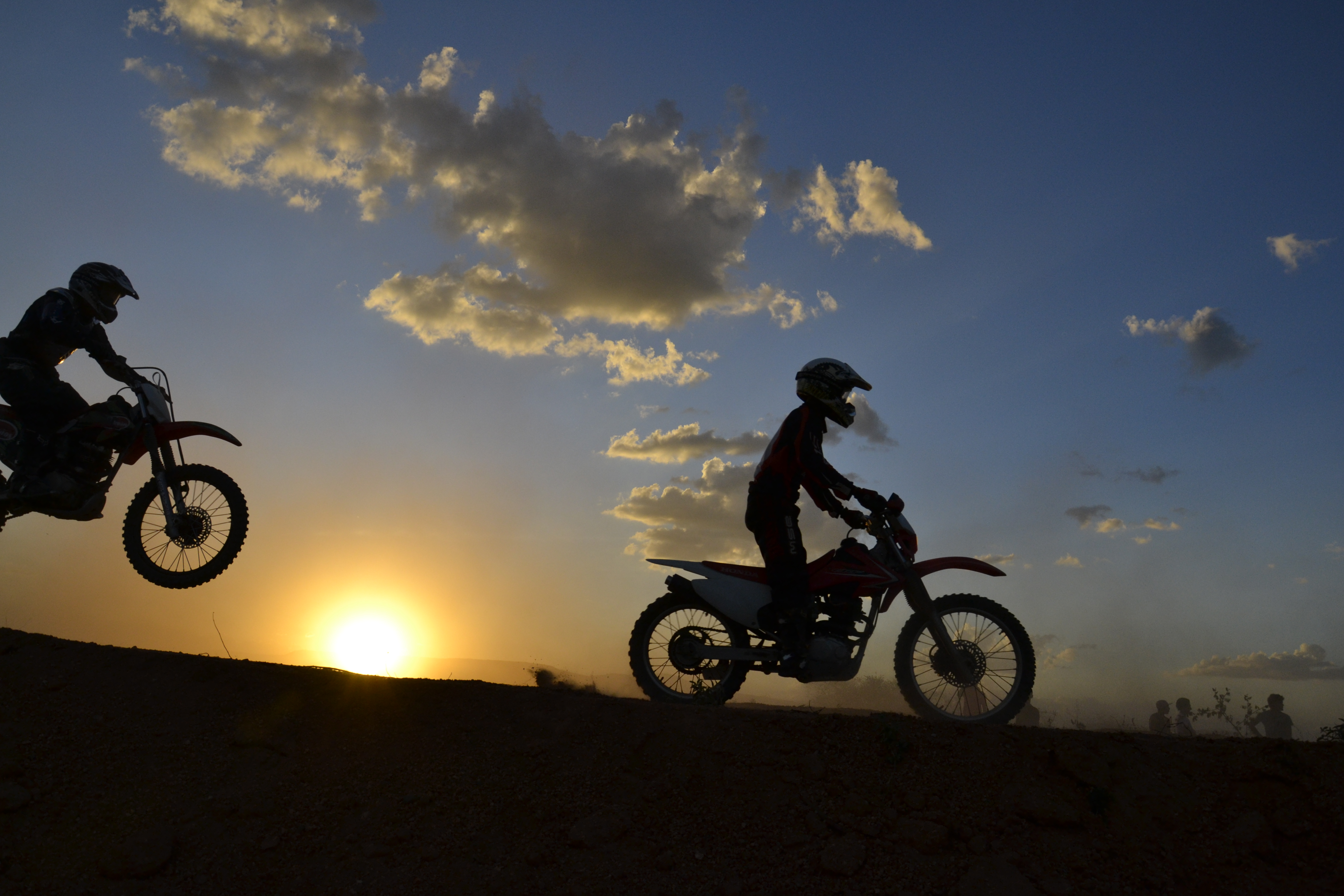 Moto Cross Vieiropolis Paraiba